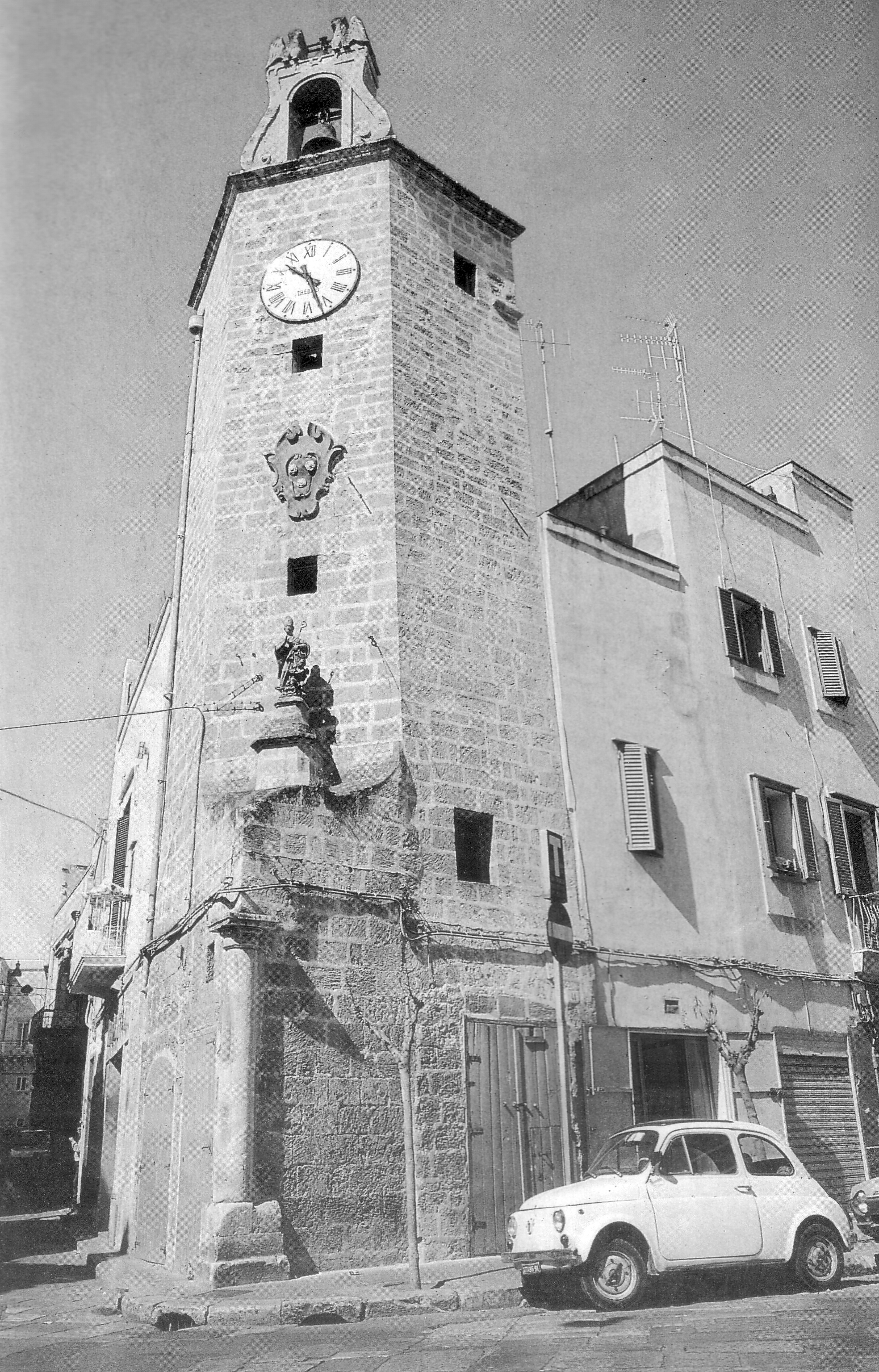 Torre dell'orologio a Monopoli.